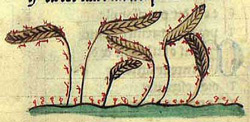 Миниатюра «Муравьи» (Национальная библиотека, Копенгаген)"Бестиарий Филиппа де Тона"